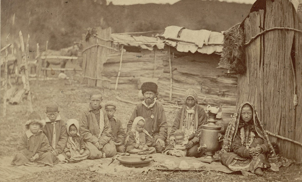 Оренбуржье. Башкирский летник. 1870-е. Автор К. Фишер.